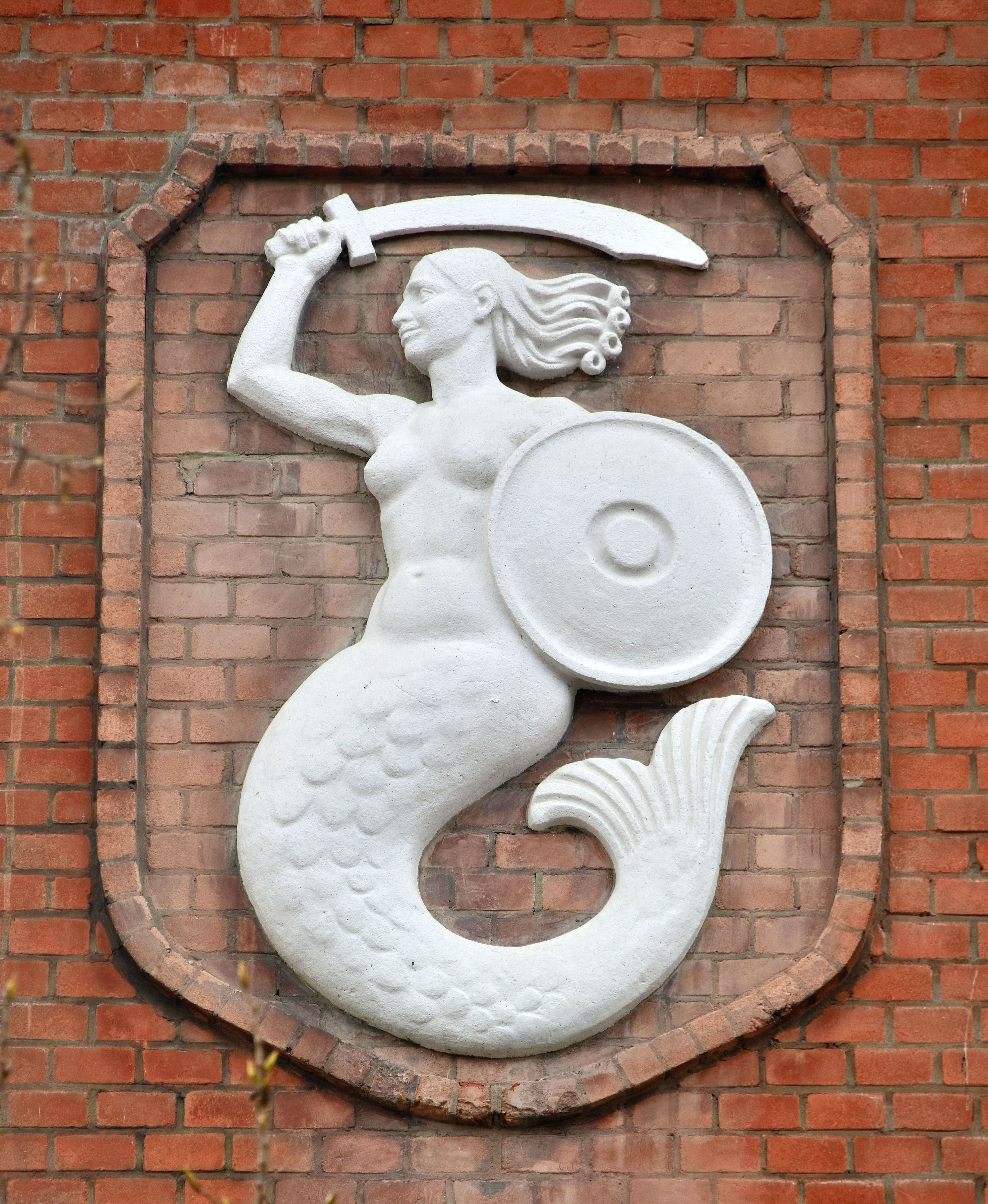 Syrenka na bocznej ścianie budynku (od strony ul. Katowickiej) XXXV Liceum Ogólnokształcące z Oddziałami Dwujęzycznymi im. Bolesława Prusa przy ul. Zwycięzców 7/9 w Warszawie